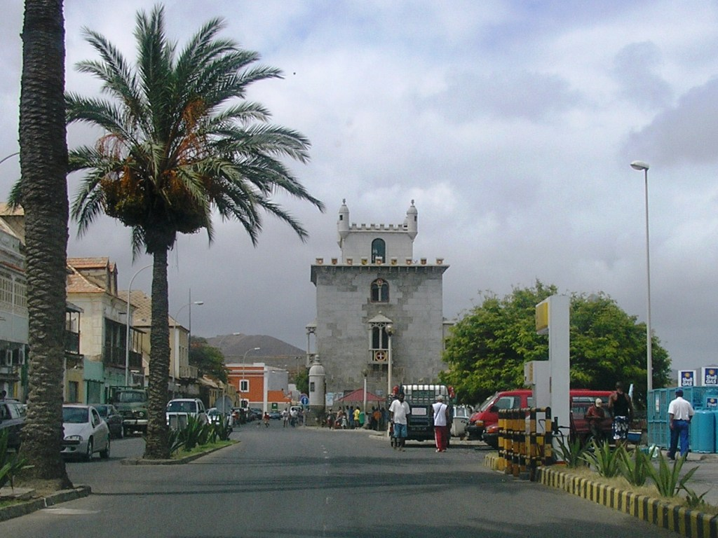 "Torre de Belém" in Mindelo town, São Vicente island, Cape Verde